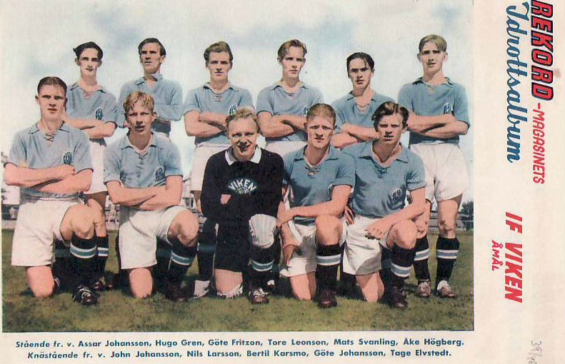 IF Viken från Åmål 1946, första året i nästhögsta divisionen.